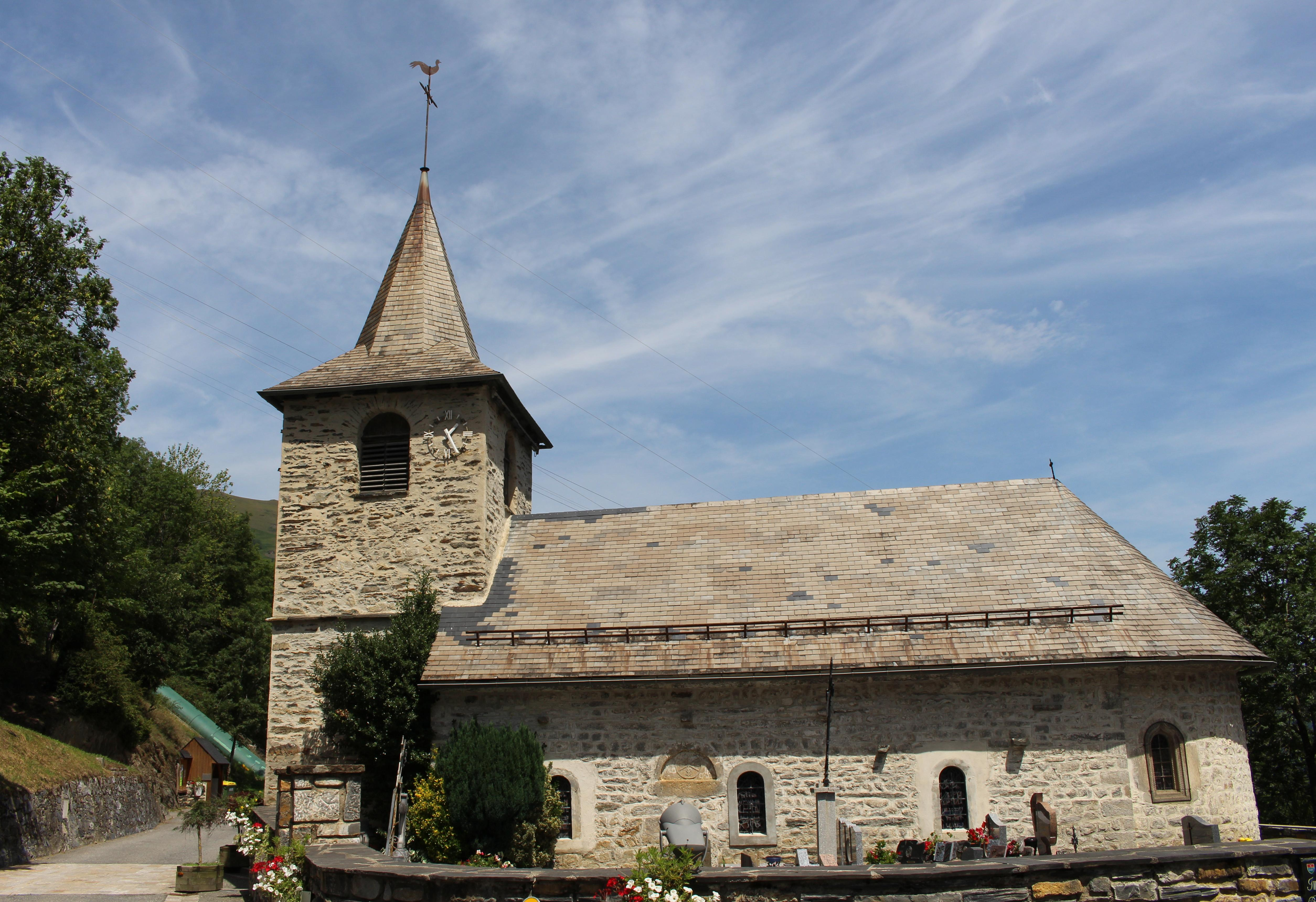 Église Saint-Missolin, Saint-Blaise de Trachère (Hautes-Pyrénées)